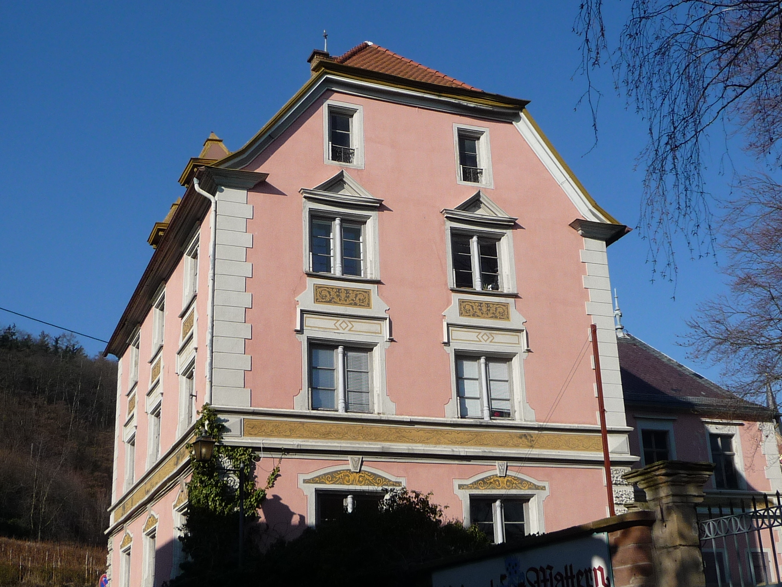 Haardt (Neustadt)